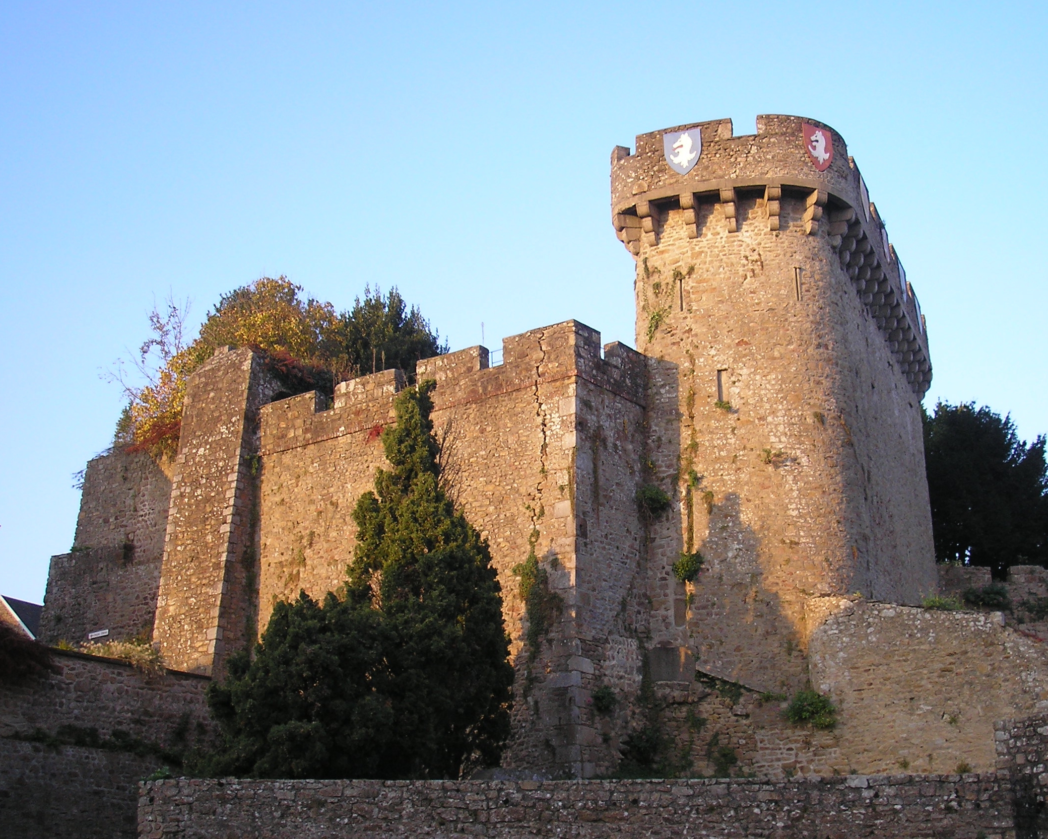 Avranches (Normandie, France). Le château.